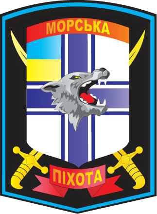 Емблема 1-го окремого Феодосійського батальйону морської піхоти